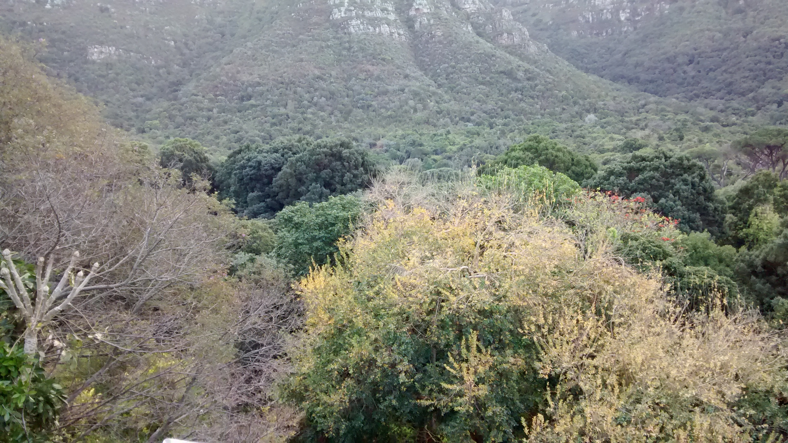 Canope d'une forêt d'afromontane, Le Cap, Afrique du Sud, août 2016